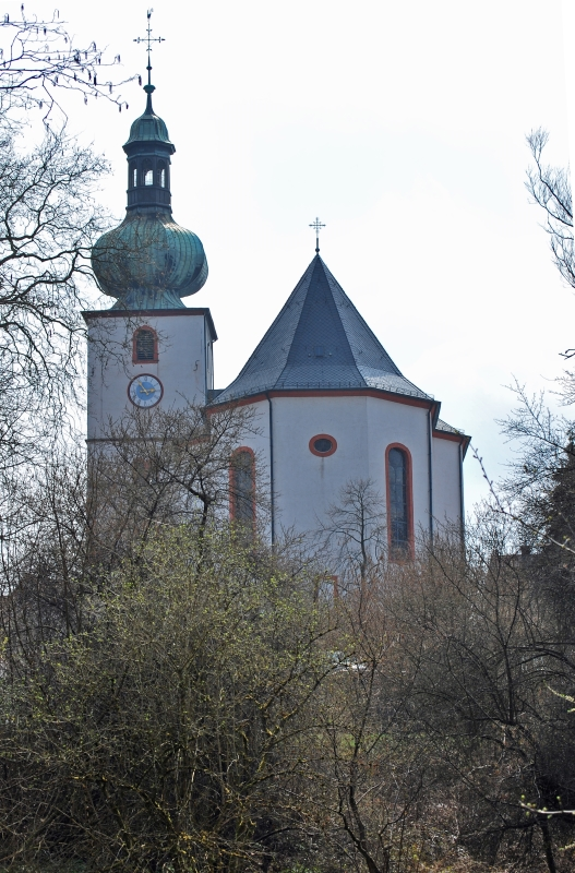 St.Stephan in Illingen (Saarland)